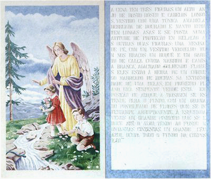 Alfredo Nicolaiewsky: "Anjo da Guarda" (1993/94, 175x200cm) Tinta acrílica s/tela. Coleção do Artista, Porto Alegre